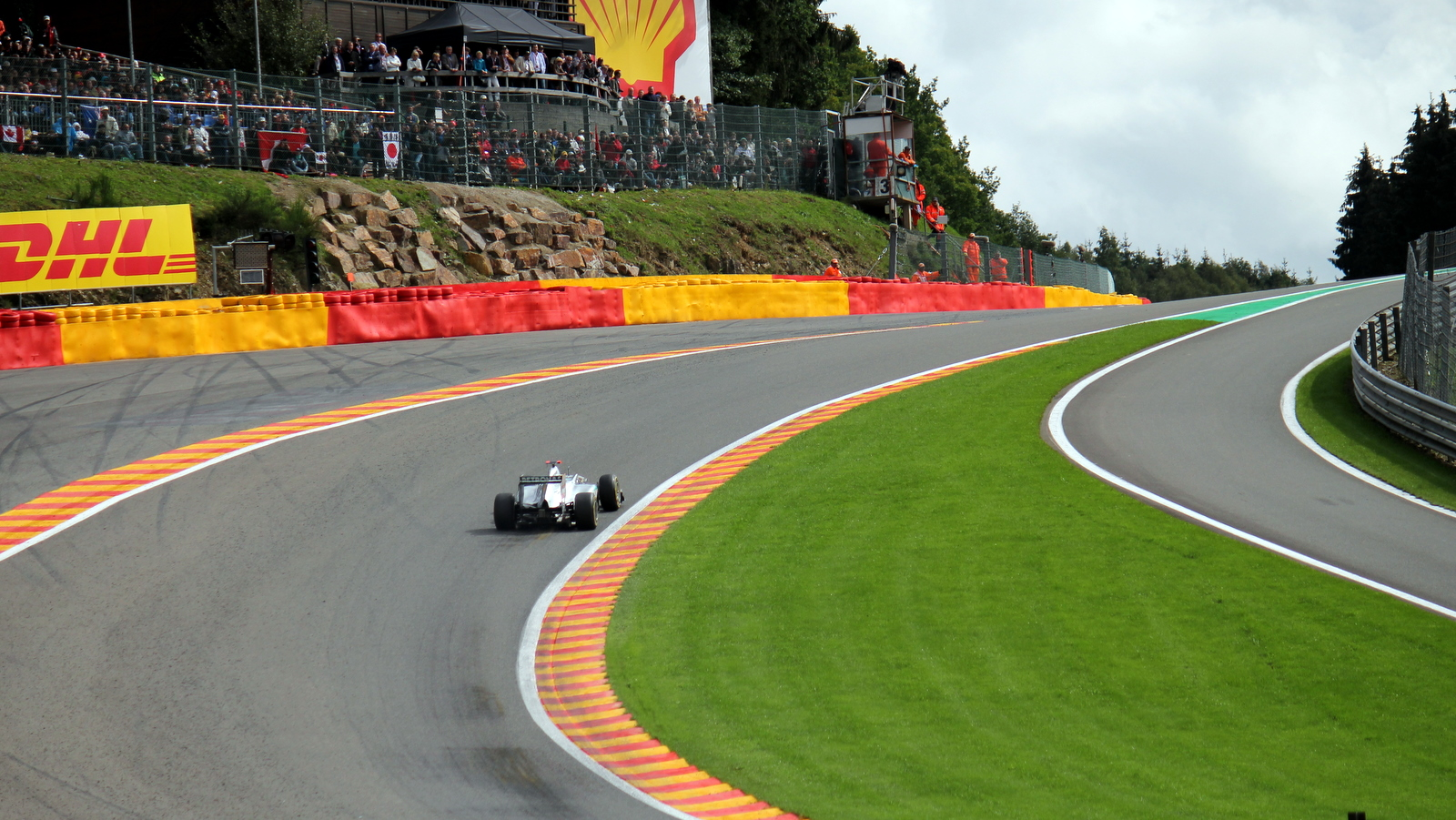 Michael Schumacher in Eau Rouge, 2011 Belgian Grand Prix